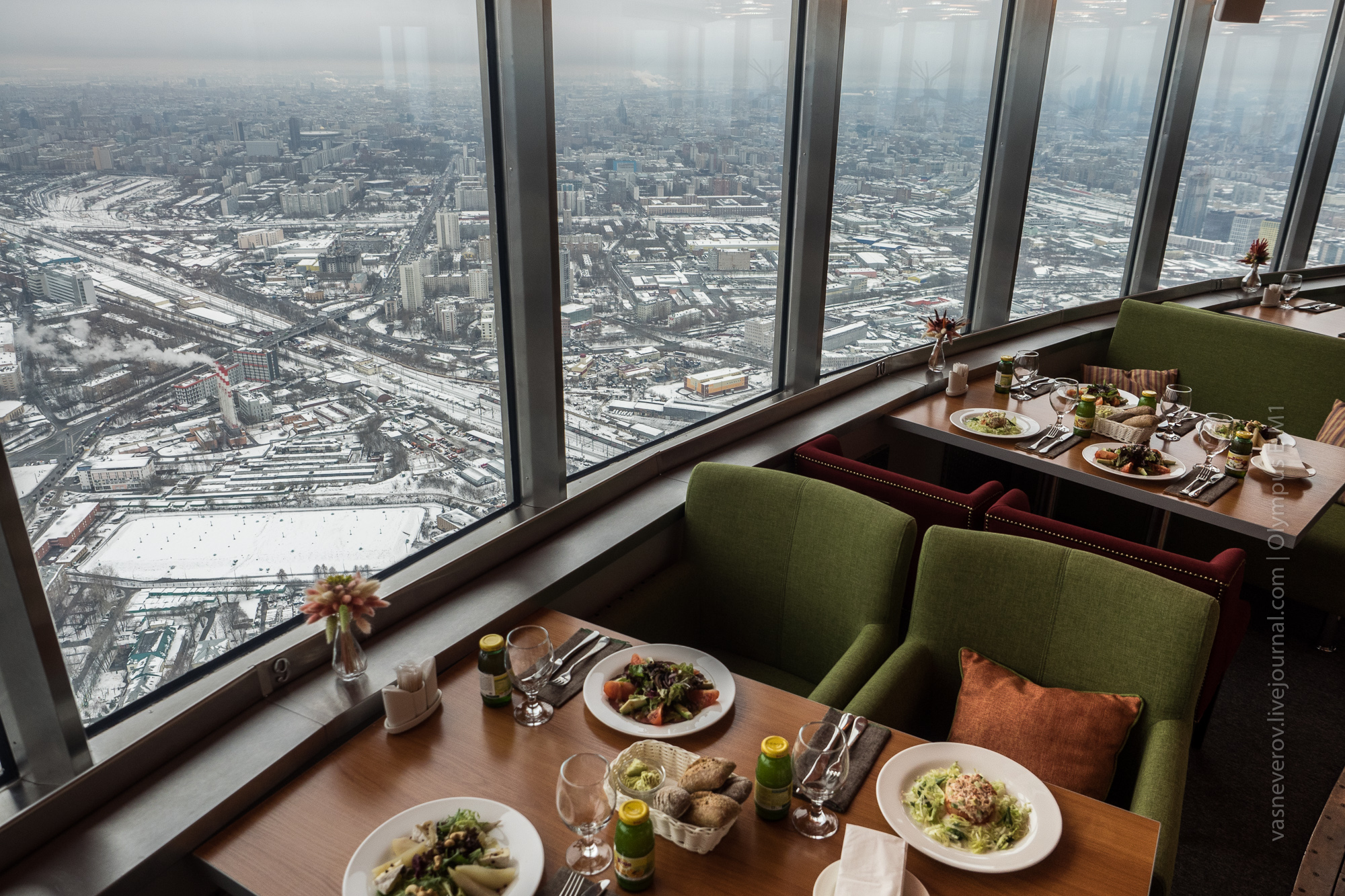 Вид из ресторана «7 небо» в направлении Рижского вокзала и Шереметьевской улицы, зима